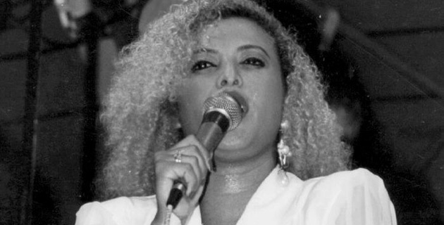 Patricia Teheran Cantando